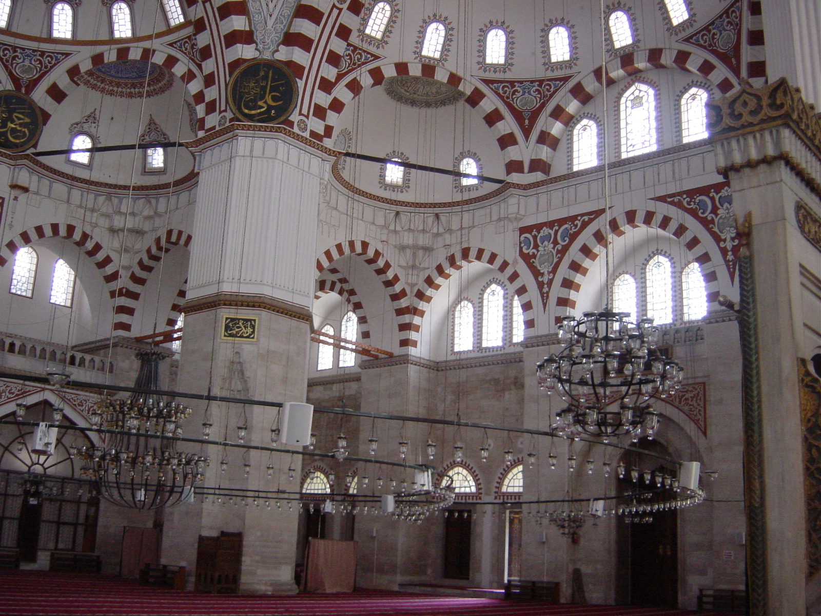 Interno della Moschea detta Sehzade camii ad Istanbul. Foto di: Giovanni Dall'Orto, 29-5-2006.